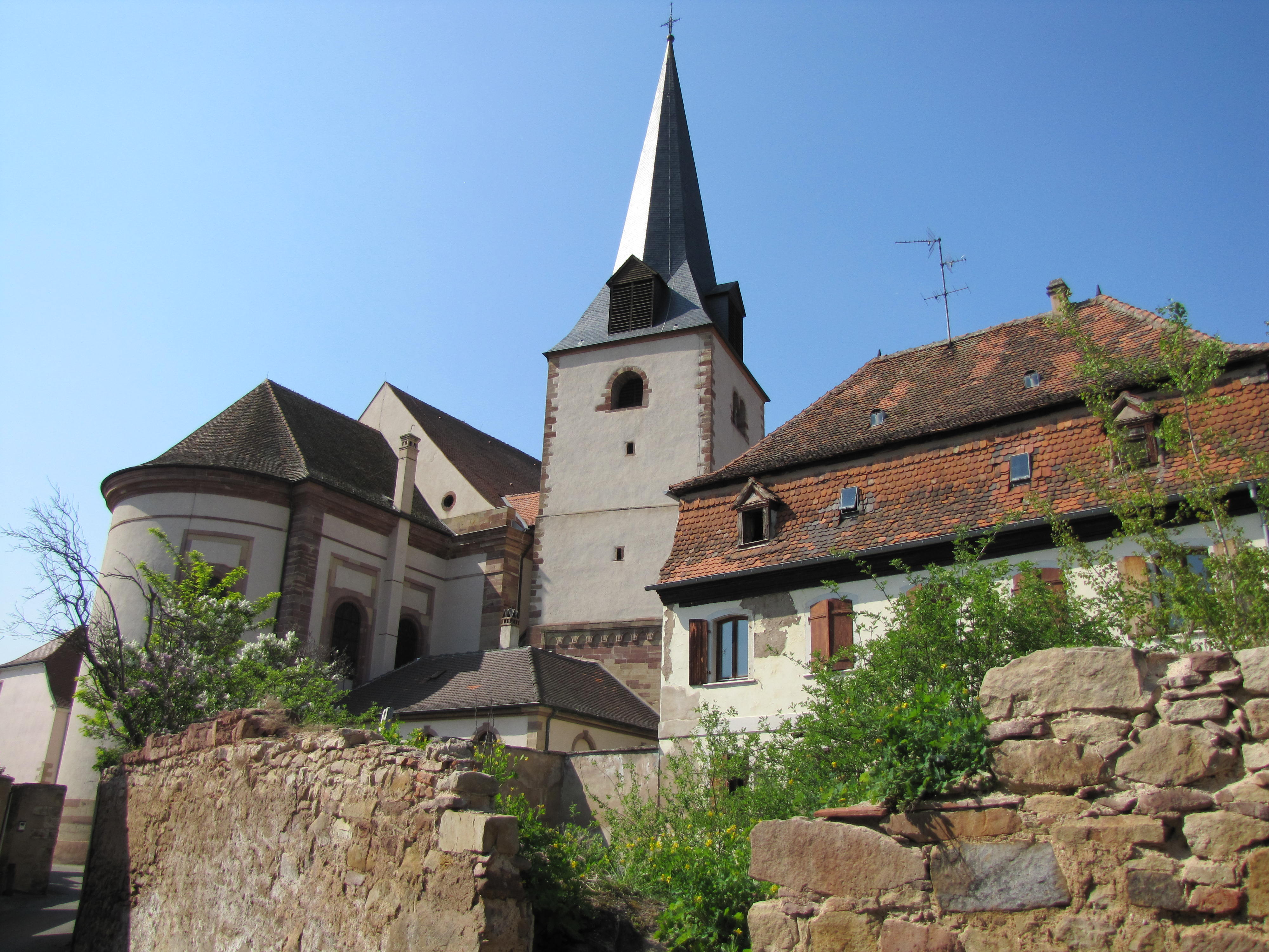 Alsace, Bas-Rhin, Rosheim, Église Saint-Étienne dite "Oberkirche" (XIIIe-XVIIIe) (PA00084908, IA00075639). Presbytère (XVIe-XVIIe-XIXe), 12 rue de l'Eglise: .